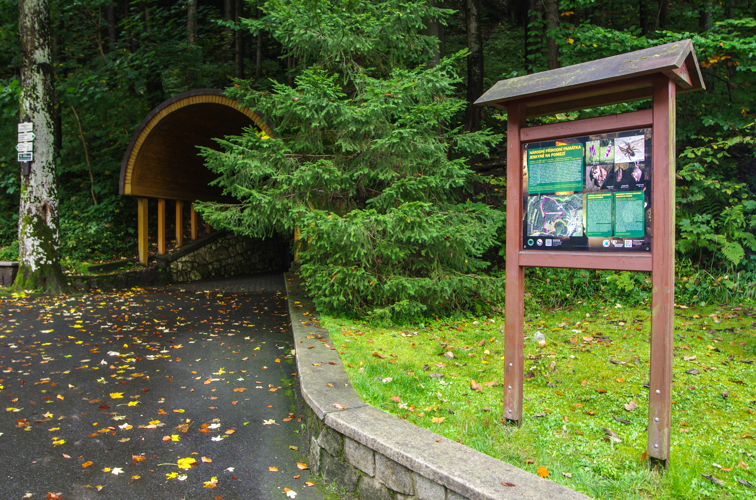 Národní přírodní památka Jeskyně na Pomezí, okres Jeseník